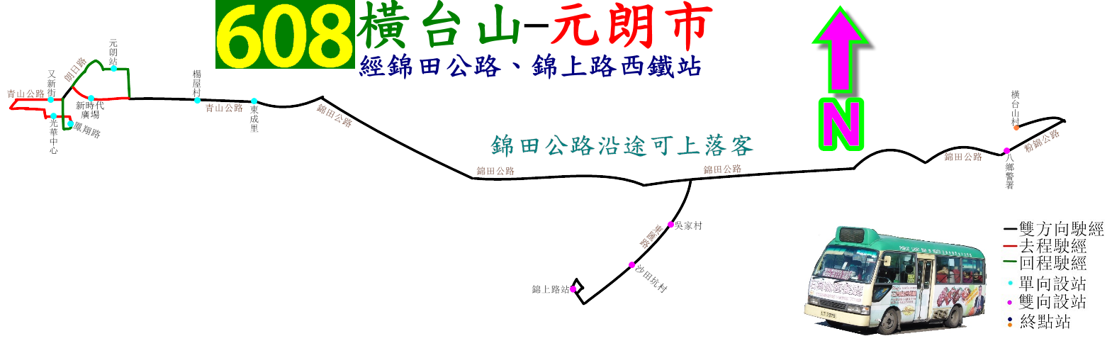 中文（香港）: 新界專線小巴608線的走線圖